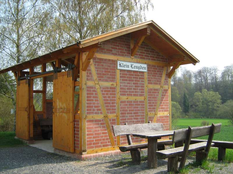 Ehemaliger Bahnhof Klein Lengden an der Gartetalbahn, heute Rastplatz am Weser-Harz-Heide-Radweg.